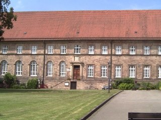 Abtei Hardehausen (C) Michael Klävers, Marienfeld